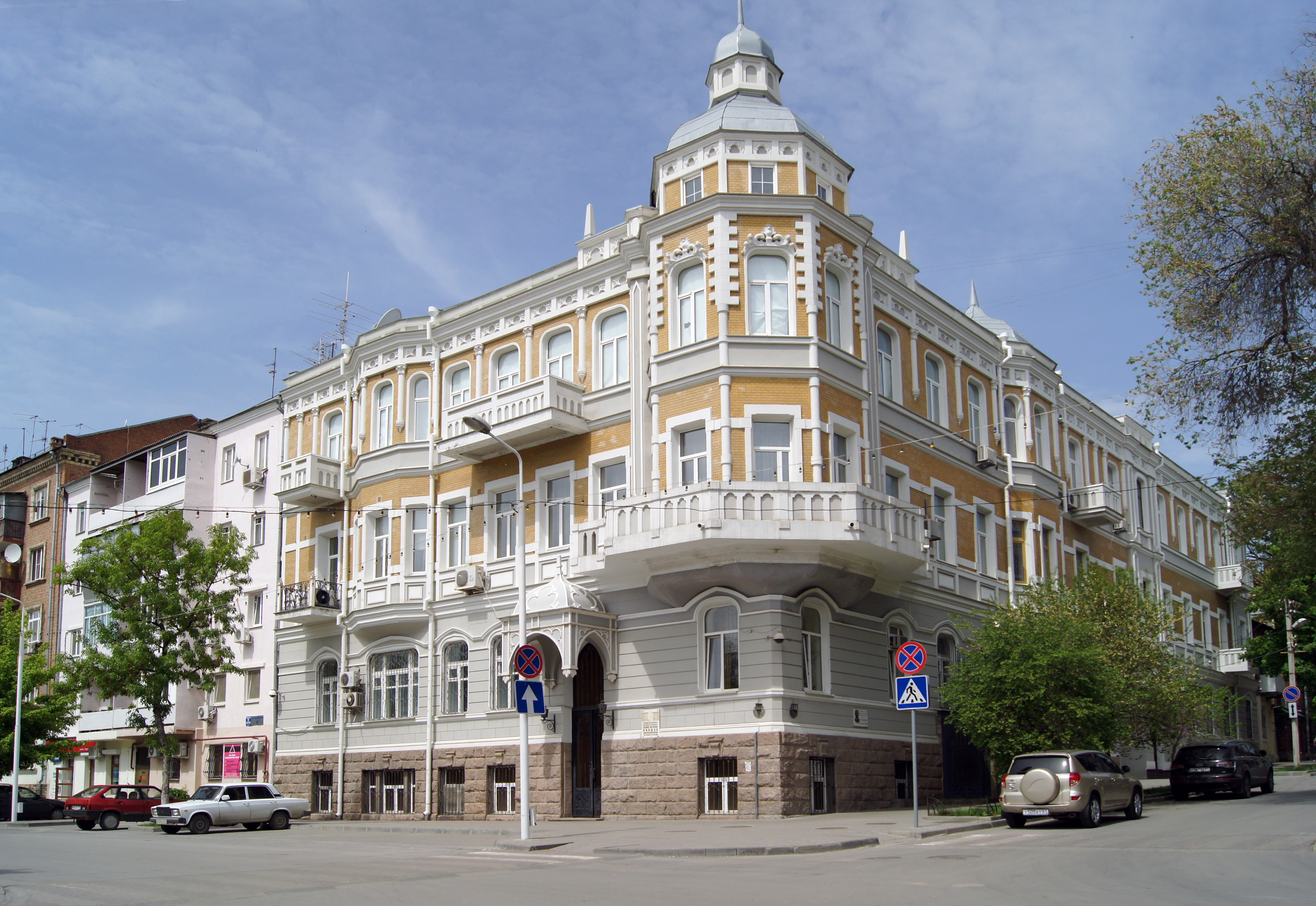 Ростов-на-Дону, Пушкинская 89/57